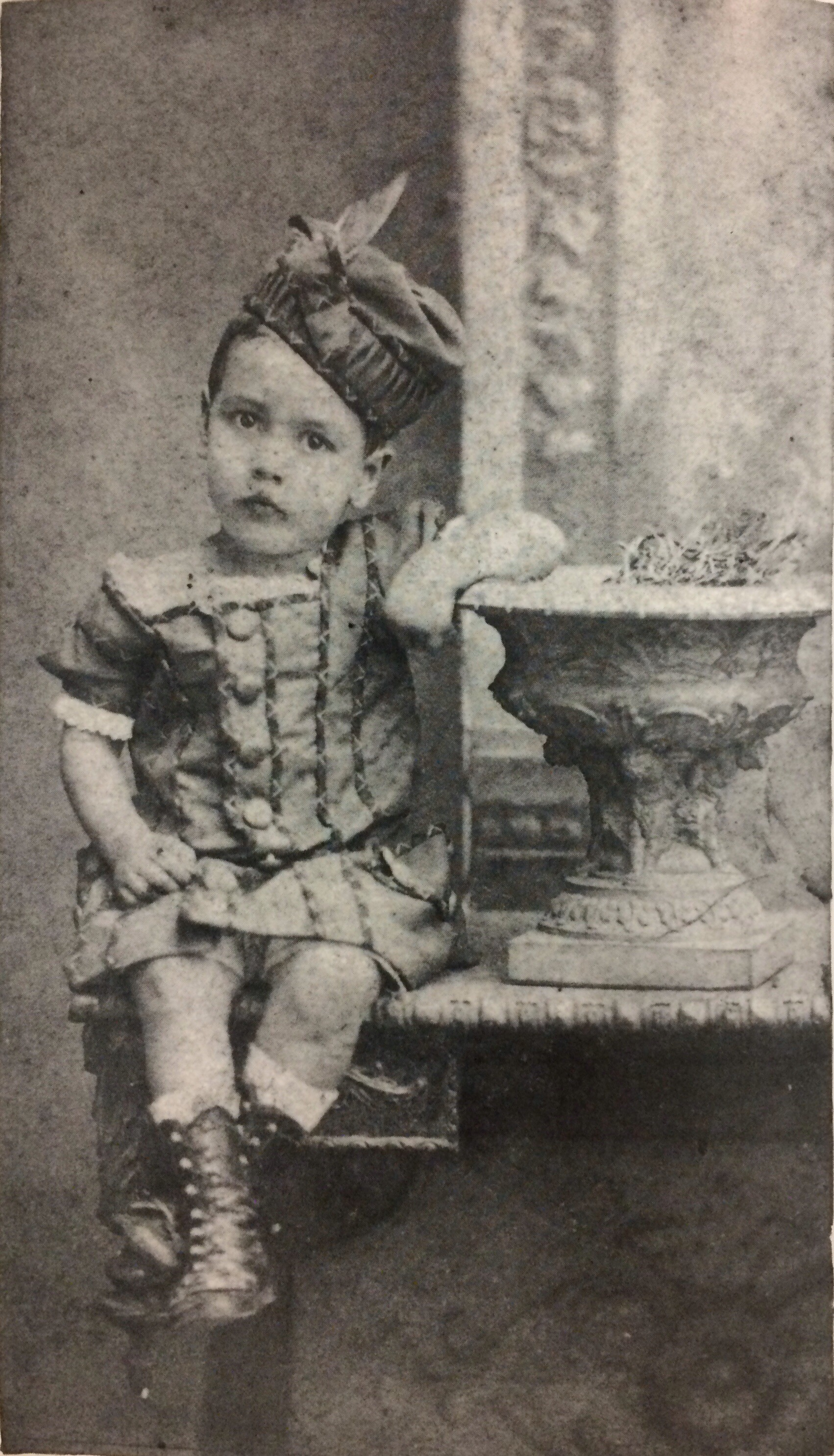 Estudios fotográficos de Próspero Rey. Niño sentado con brazo izquierdo sobre jarrón C.1866